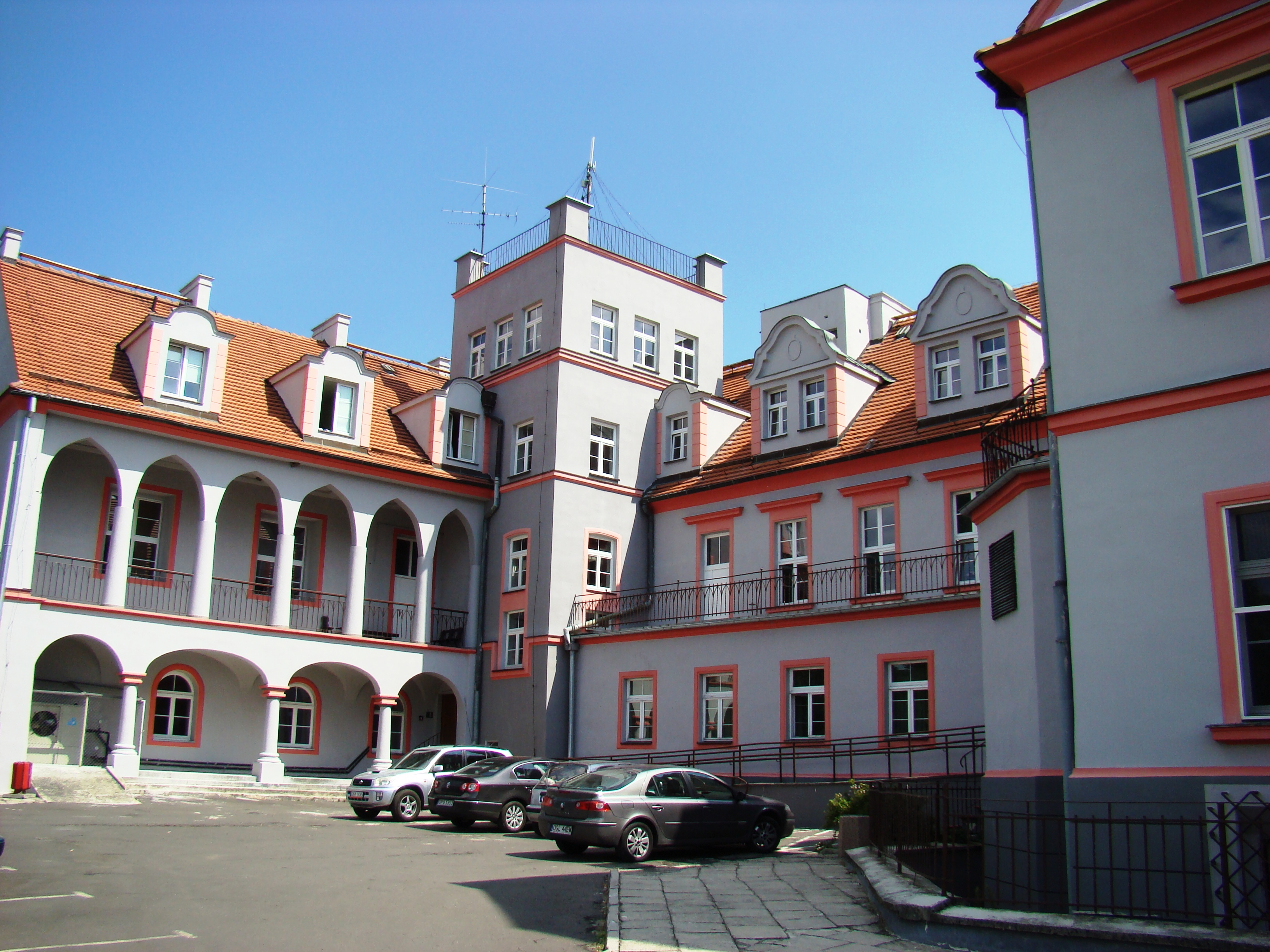 Zamek w Korfantowie, obecnie szpital, od strony zachodniej Korfantów 11.1950.